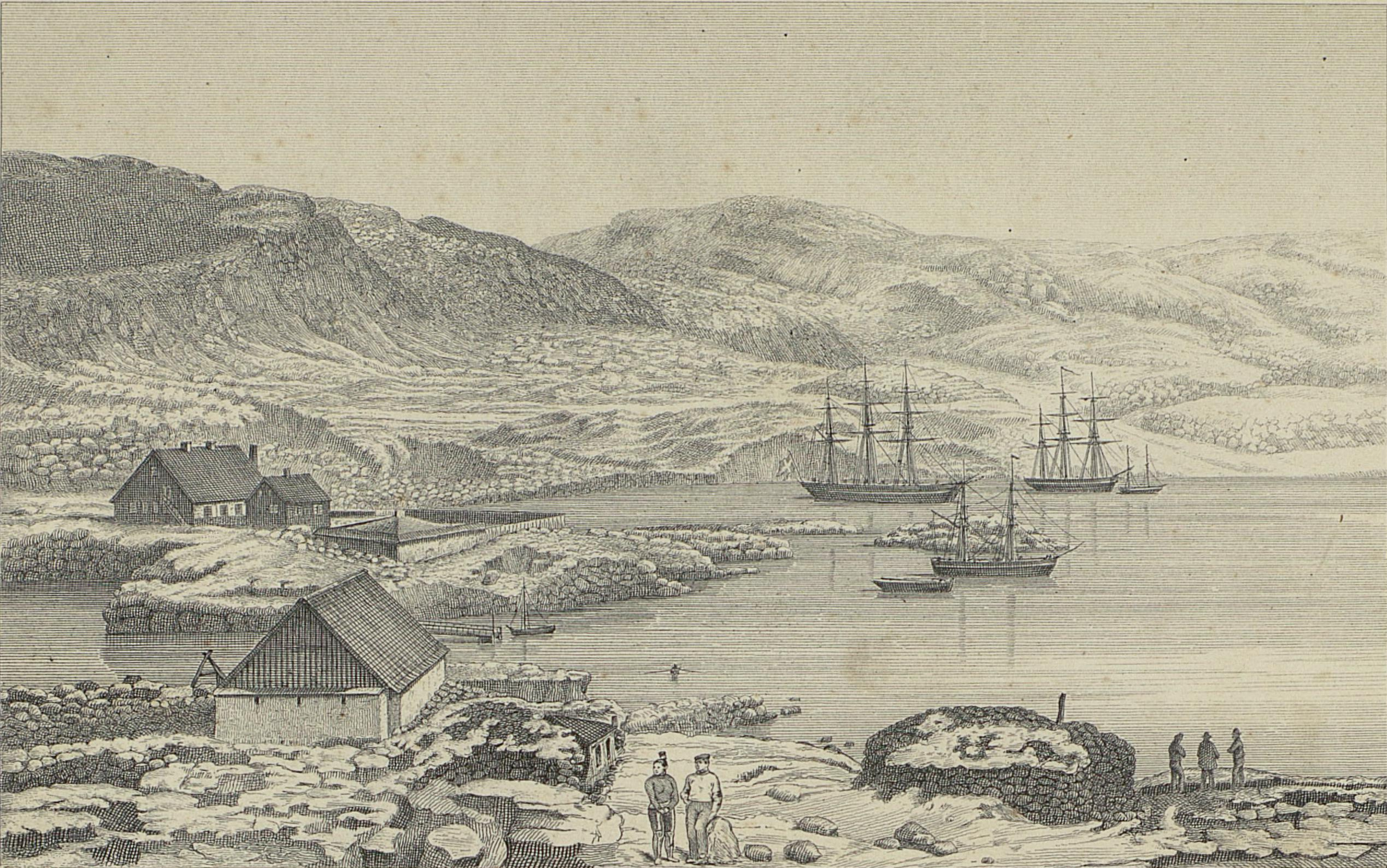 Illustrasjon hentet fra boken "Fox-Expeditionen i Aaret 1860 over Færøerne, Island og Grønland" av Zeilau, Th. og utgitt av Wøldike (Kjøbenhavn, 1861)